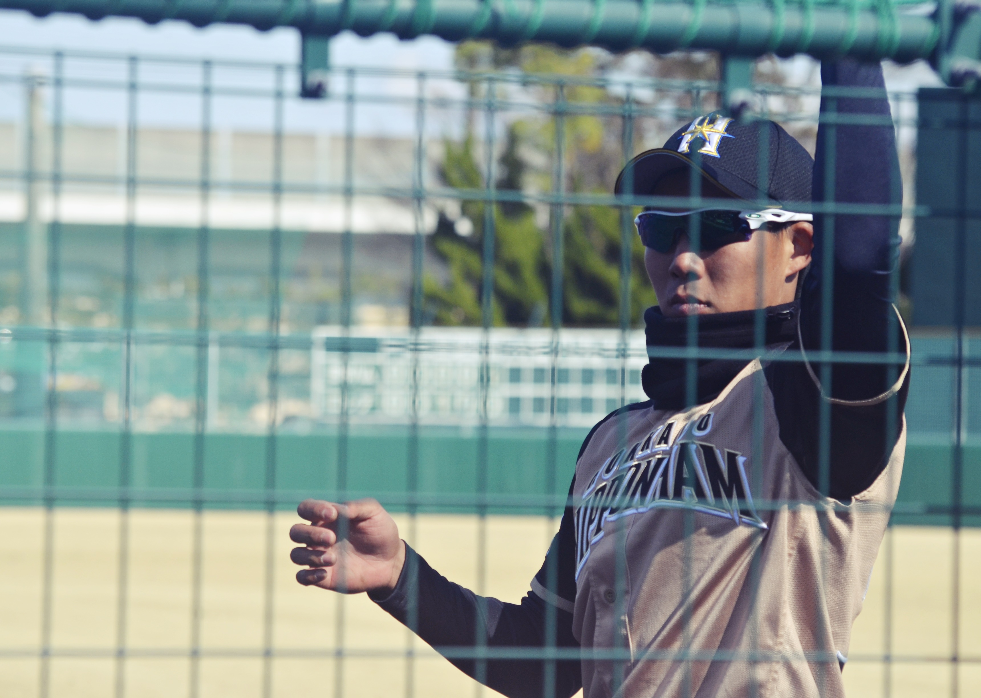 日本ハムファイターズの難波侑平くん